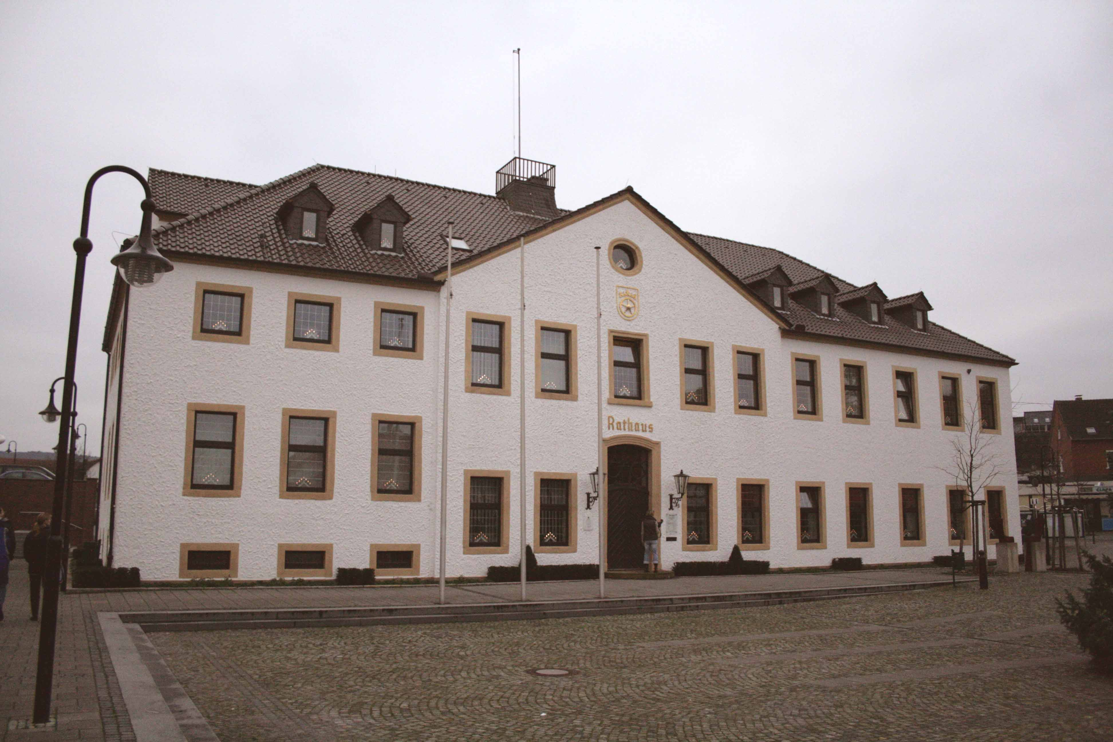 Rathaus in Dissen (Germany), Landkreis Osnabrück